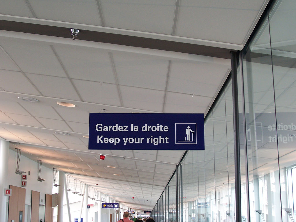 Señalización bilingüe en el Aeropuerto Pierre Elliott Trudeau de Montreal (Quebec, Canadá). Licencia Creative Commons Reconocimiento 2.0.